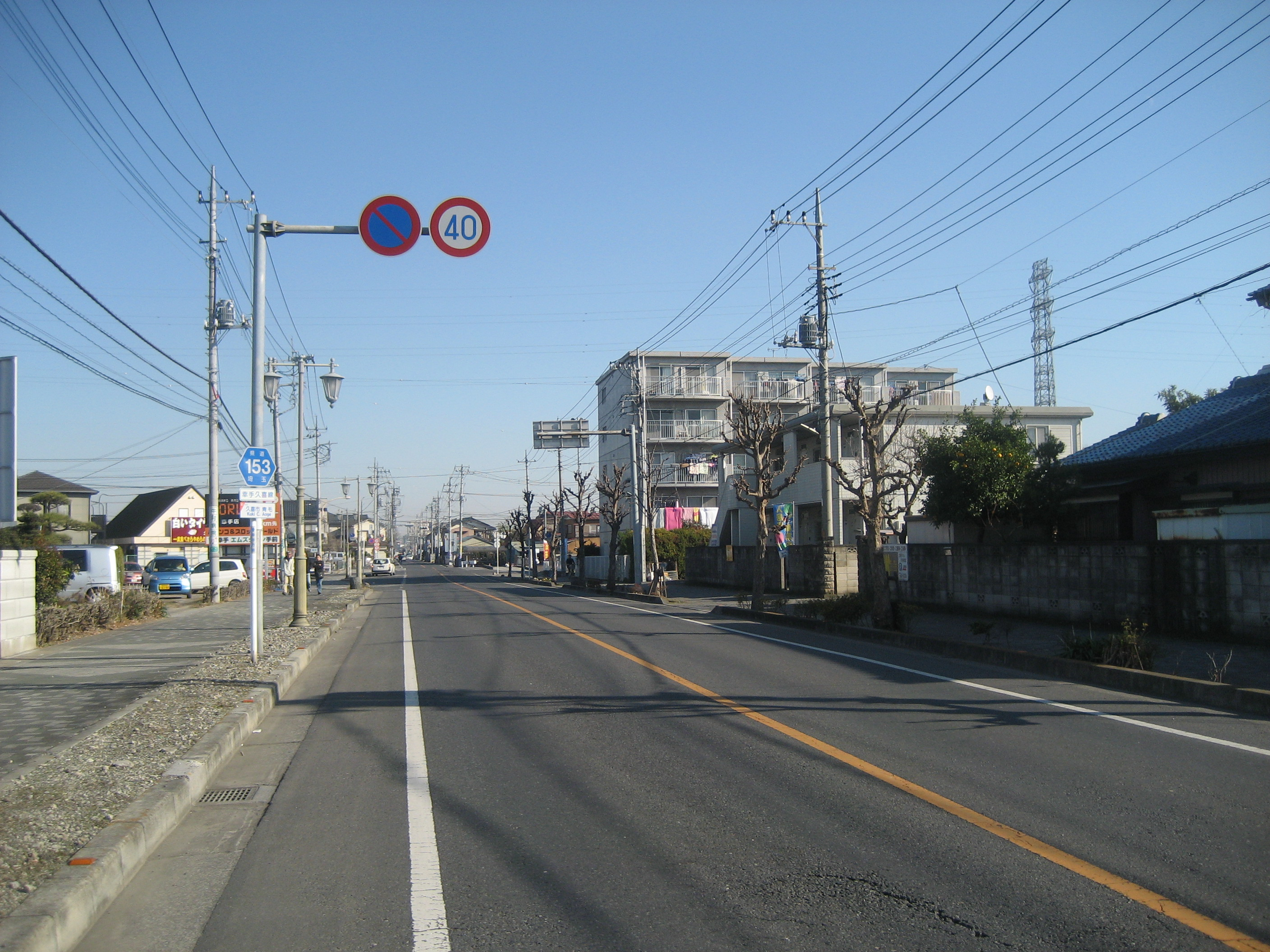 埼玉県道153号線久喜市内